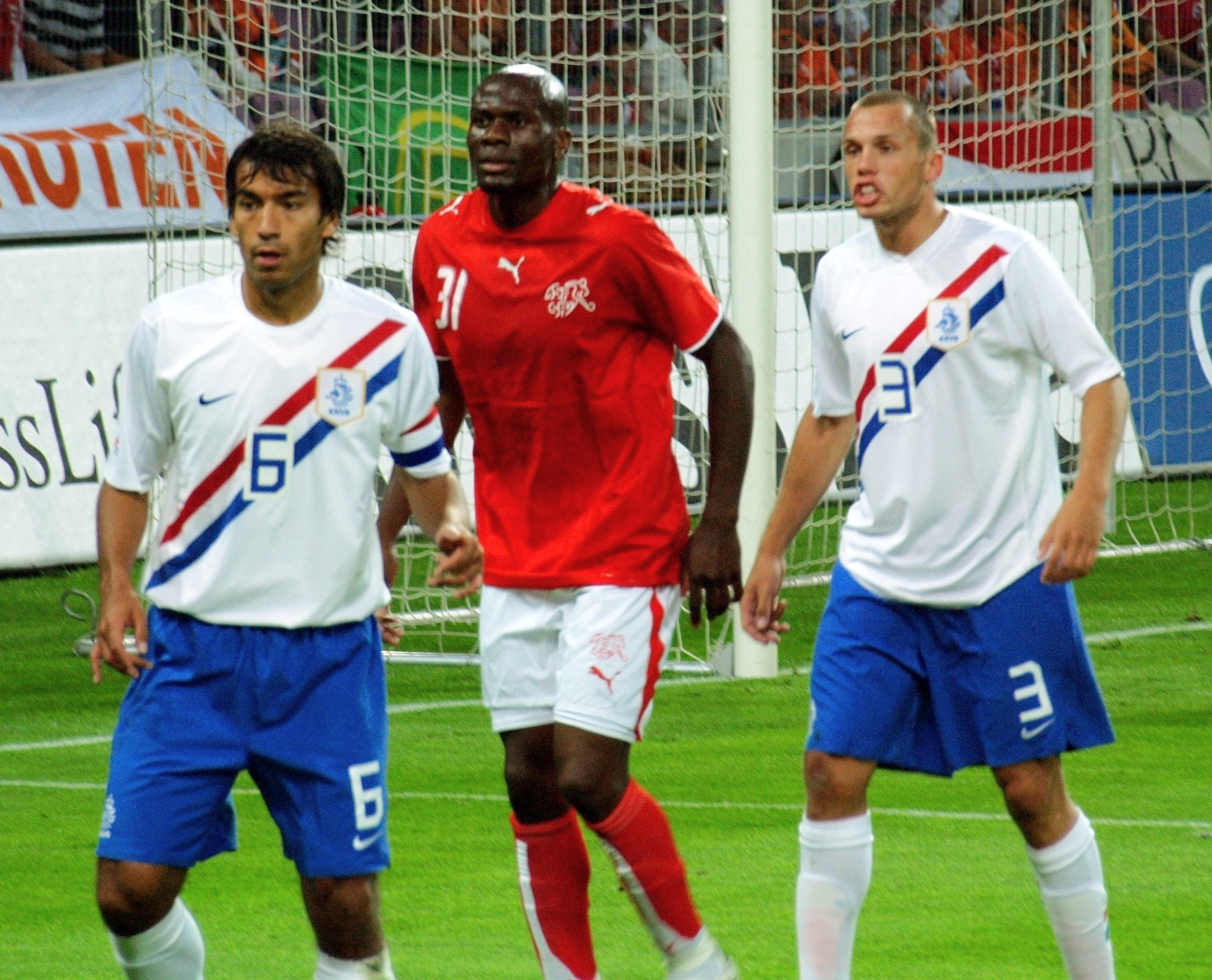 Giovanni van Bronckhorst, Blaise Nkufo, Johnny Heitinga